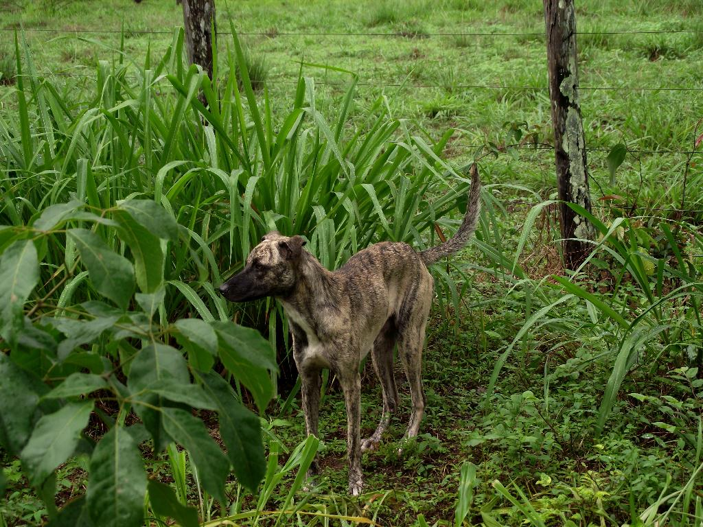 Cachorro vira-lata em uma chácara no interior do estado Maranhão, Brasil.